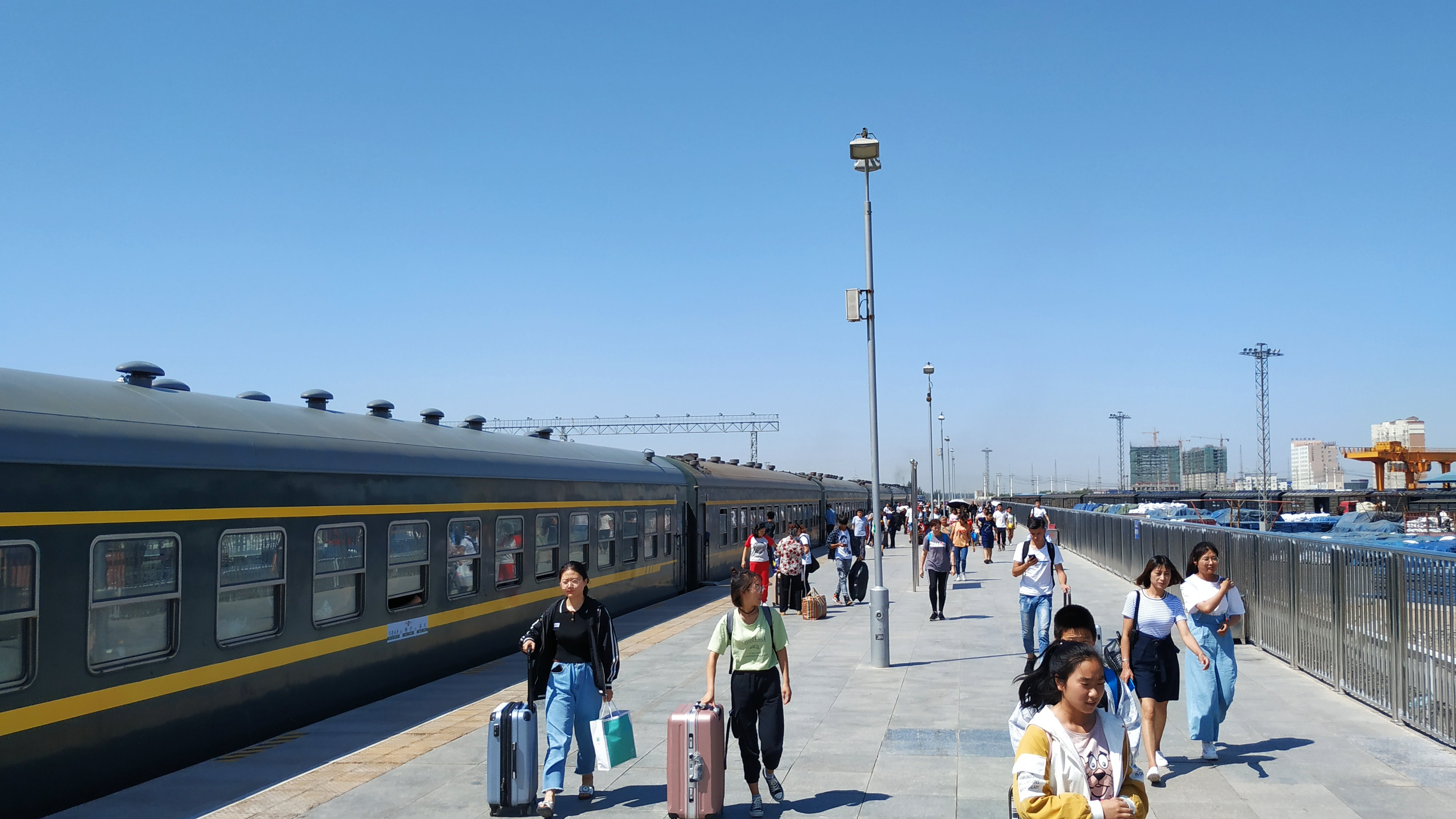 中文（中国大陆）: 阿克苏站站台